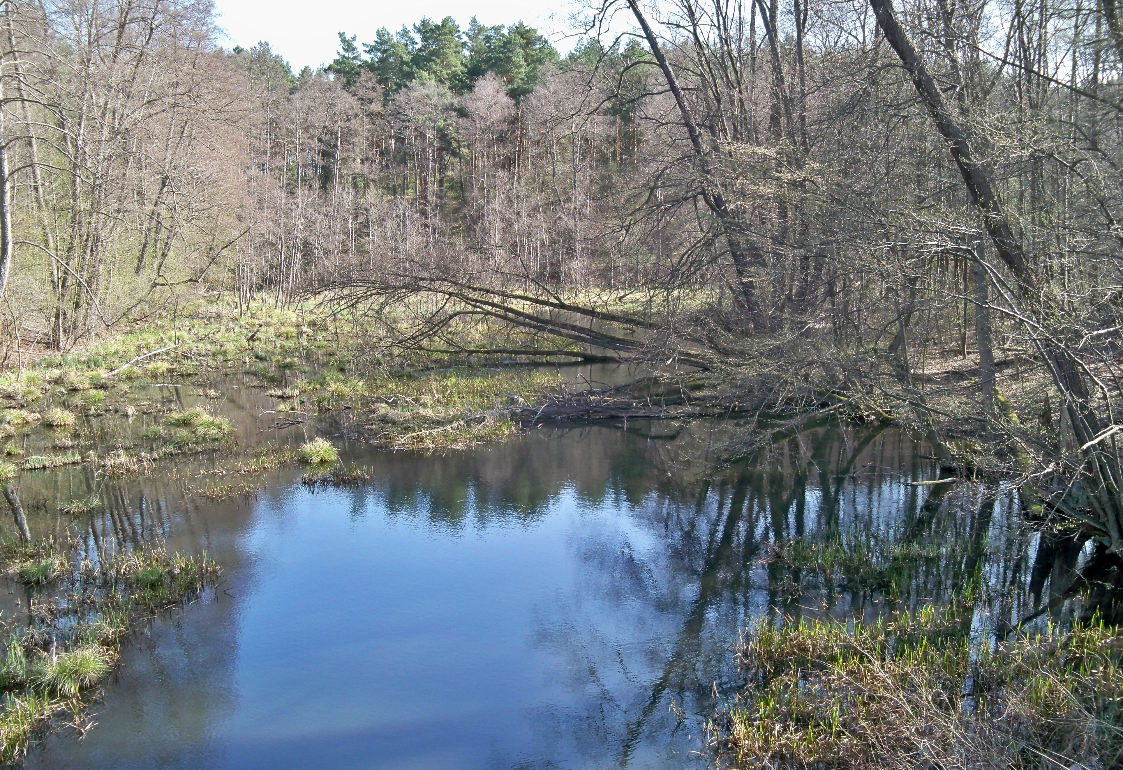 Rozlewiska rzeki Pliszki w miejscowości Pliszka.